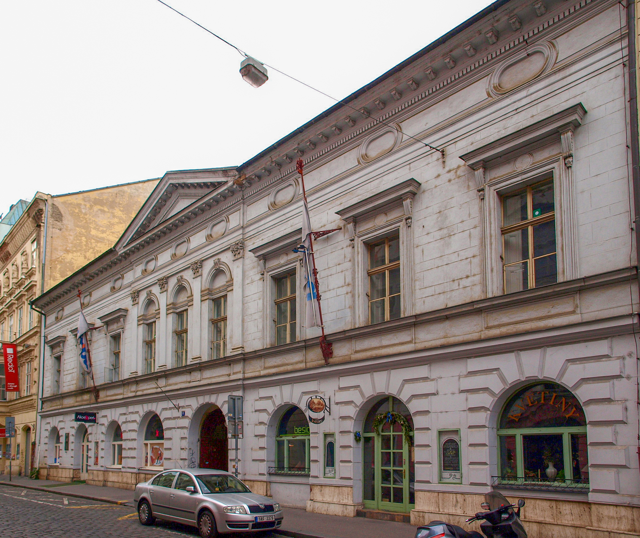 Millesimovský palác Panská 8